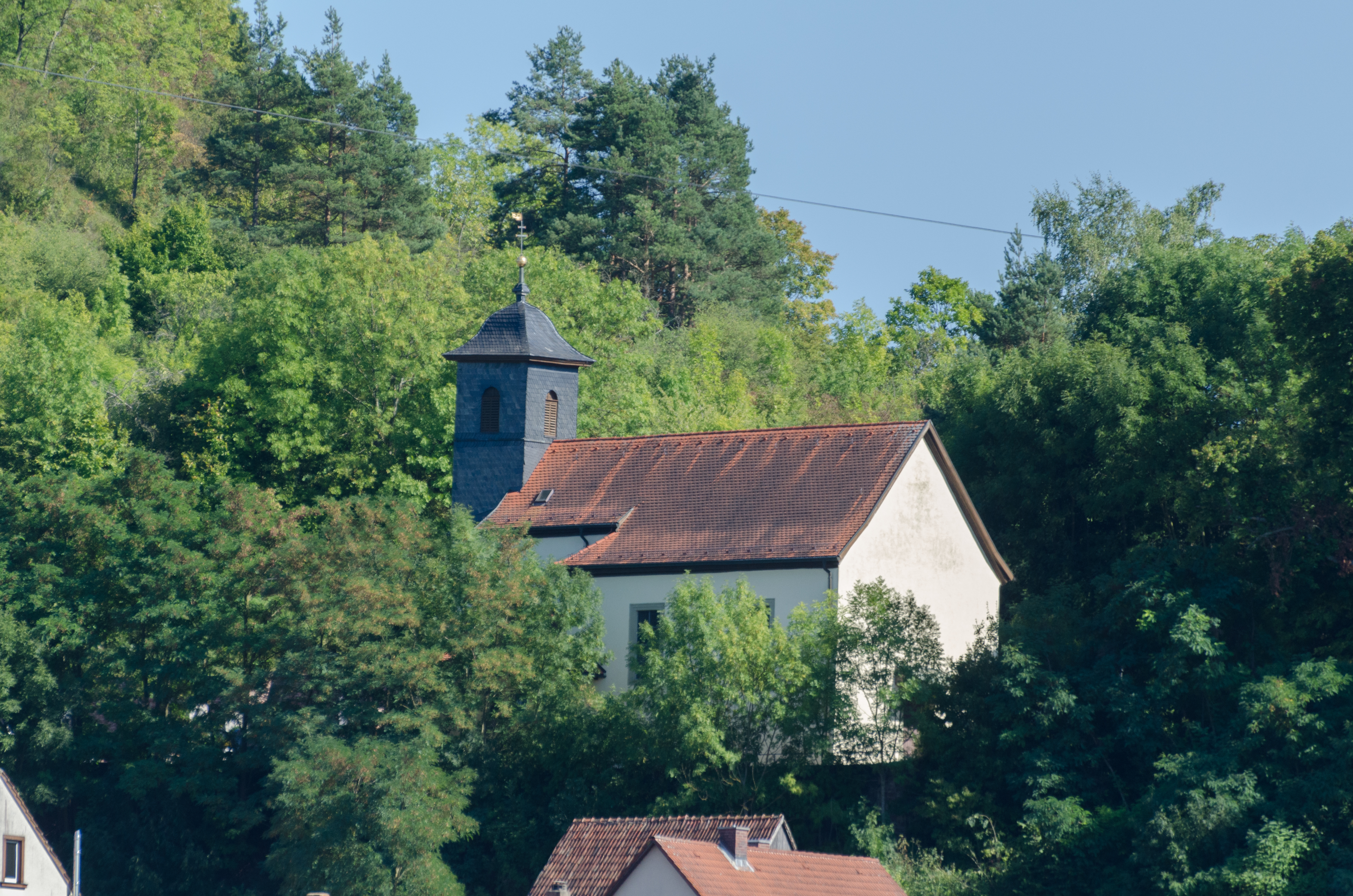 Trimberg, Katholische Filialkirche St. Elisabeth